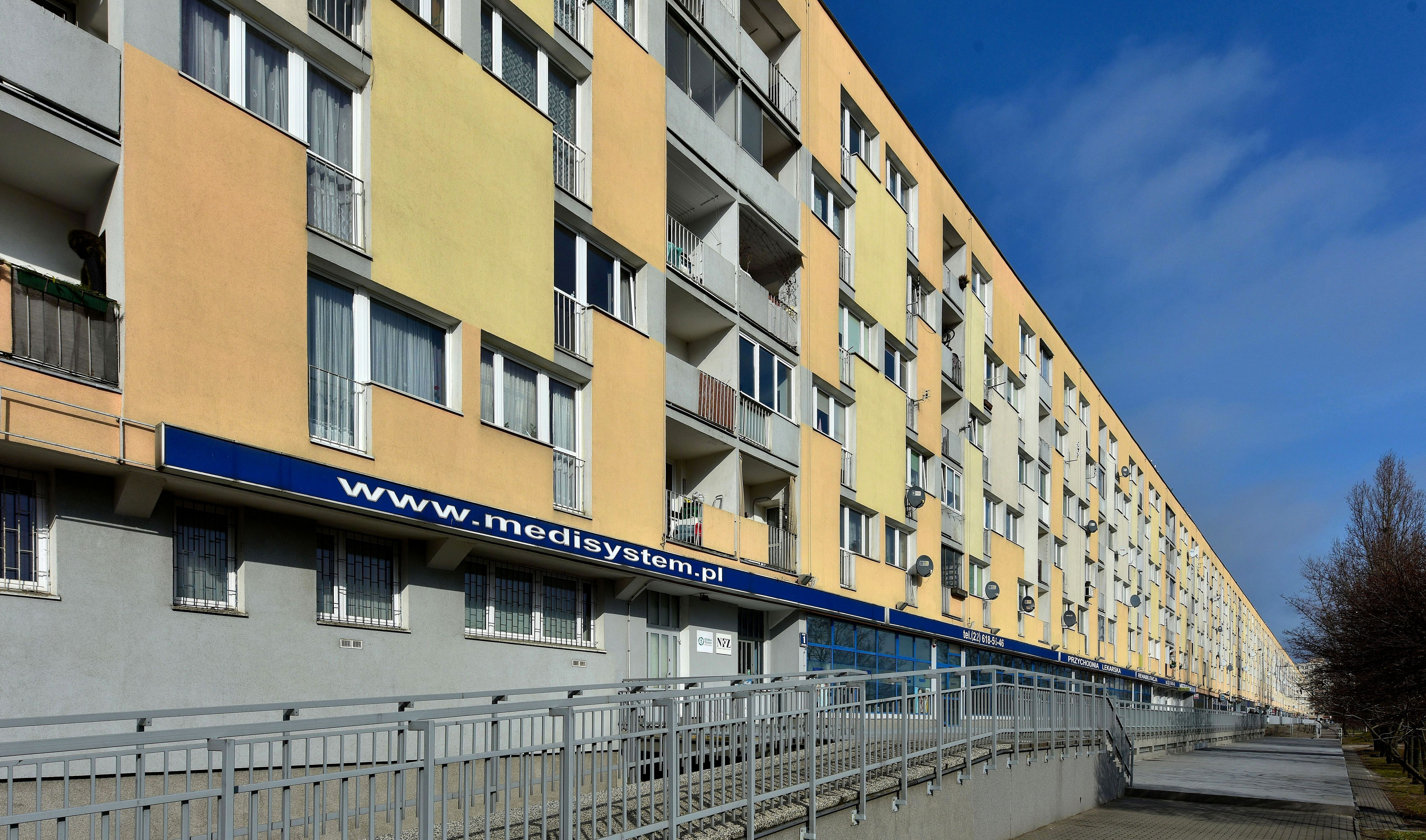 Blok mieszkalny przy ul. Kijowskiej 11 w Warszawie, nazywany zwyczajowo jamnikiem